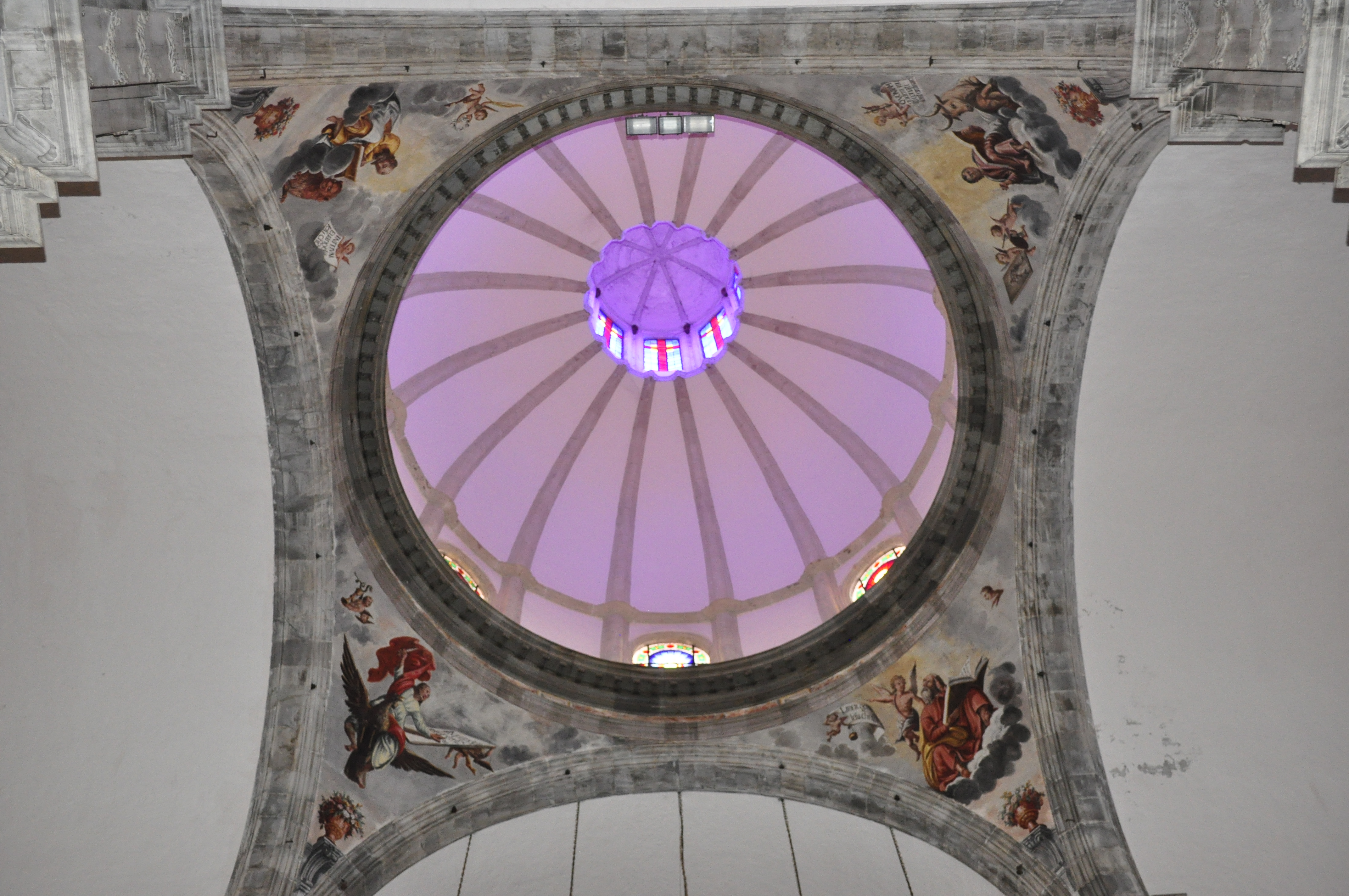 Die Kuppel des Hauptschiffs der Kirche „Nuestra Señora de la Concepción“